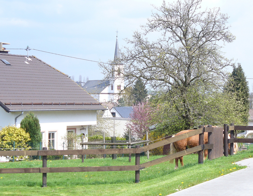 Binsfeld bei Wittlich.